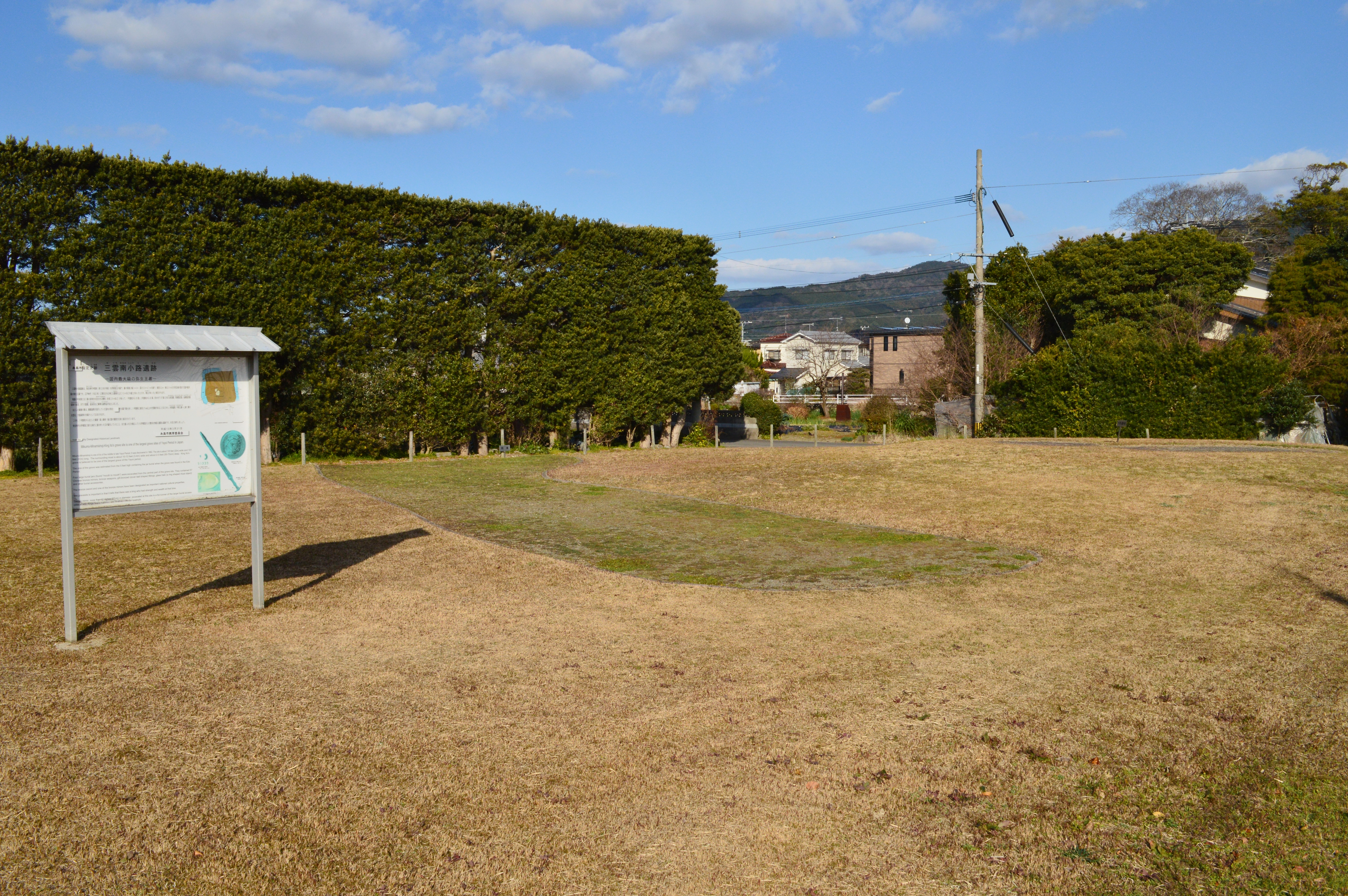 三雲南小路遺跡 墳丘墓全景